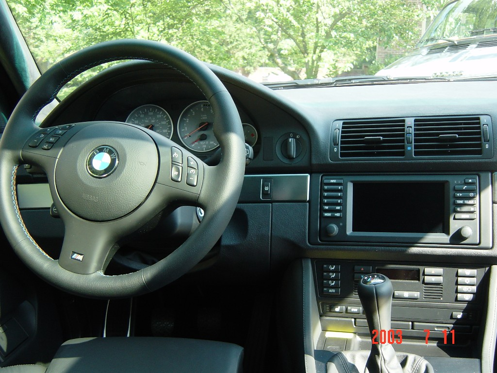 2003 BMW M5 interior